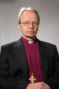 Arkkipiispa Kari Mäkinen